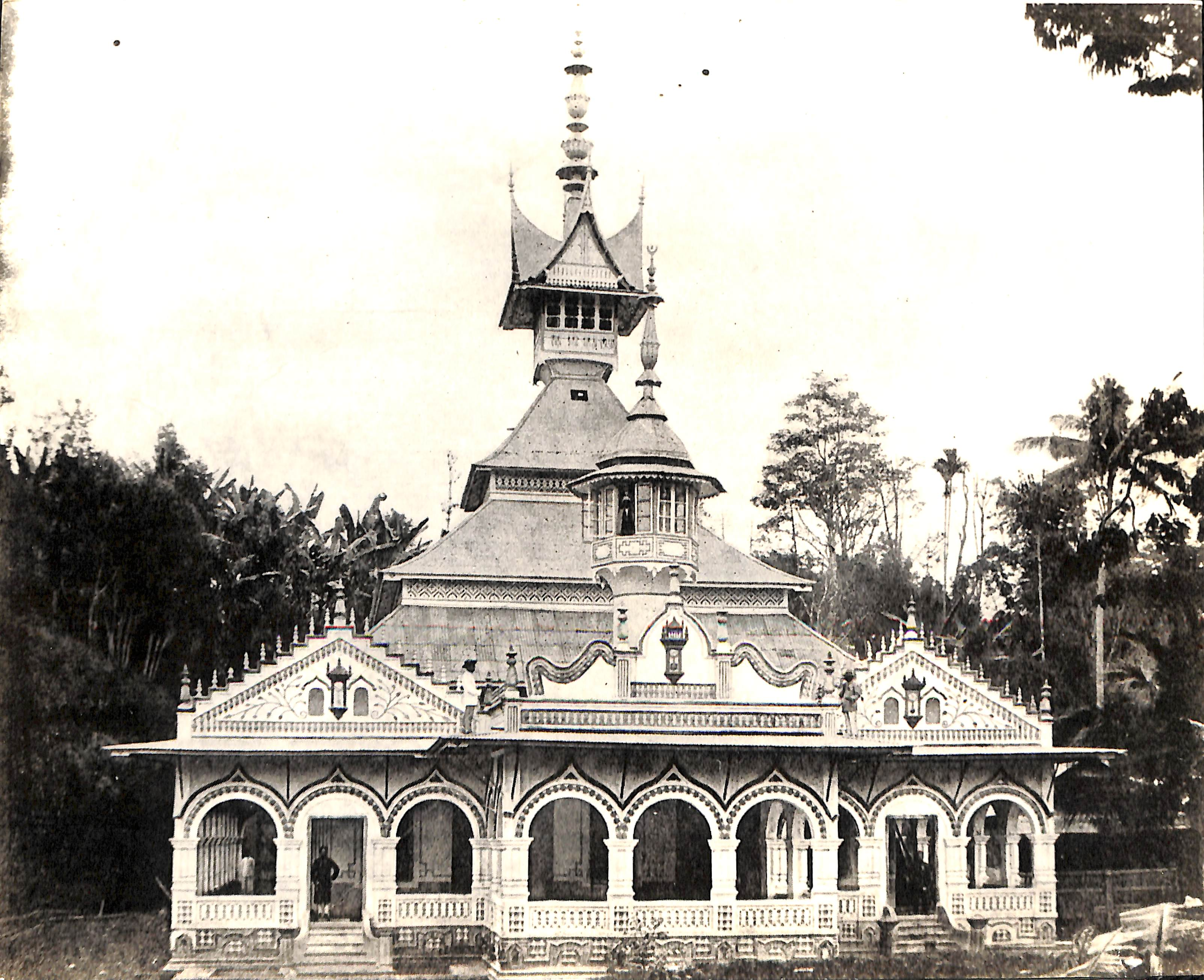 Masjid Rao Rao di Nagari Rao Rao, Sumatera Barat.